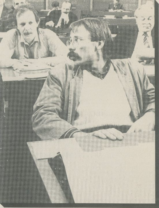 Plenarsitzung Nieders. Landtag